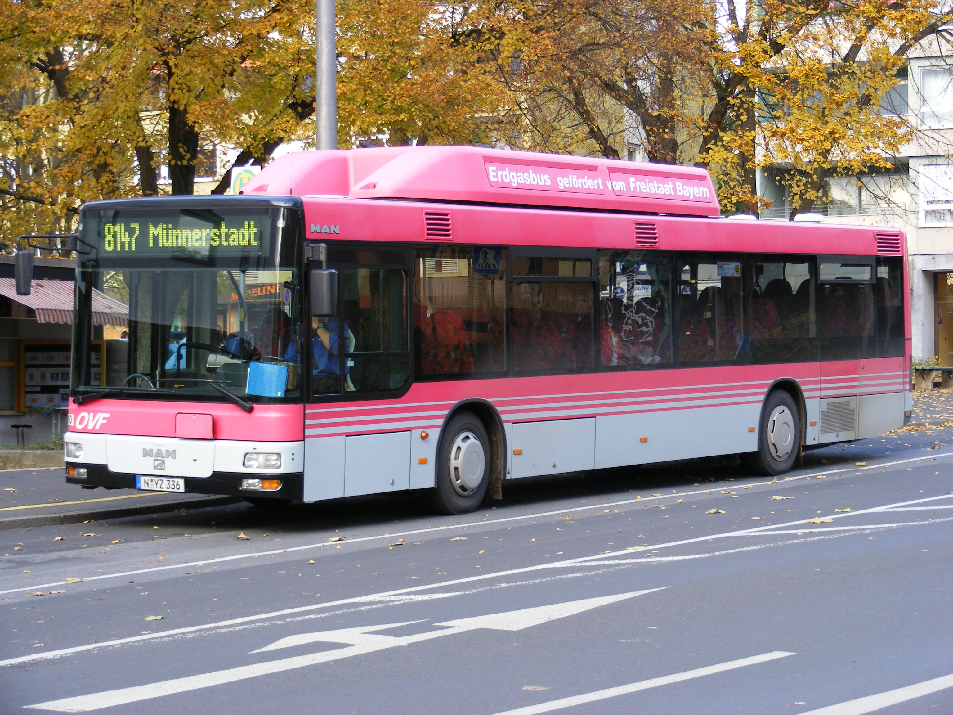 MAN-Erdgasbus (eingesetzt im Linienverkehr Bad Kissingen) - Omnibusverkehr Franken (Linie 8147 Richtung Münnerstadt)